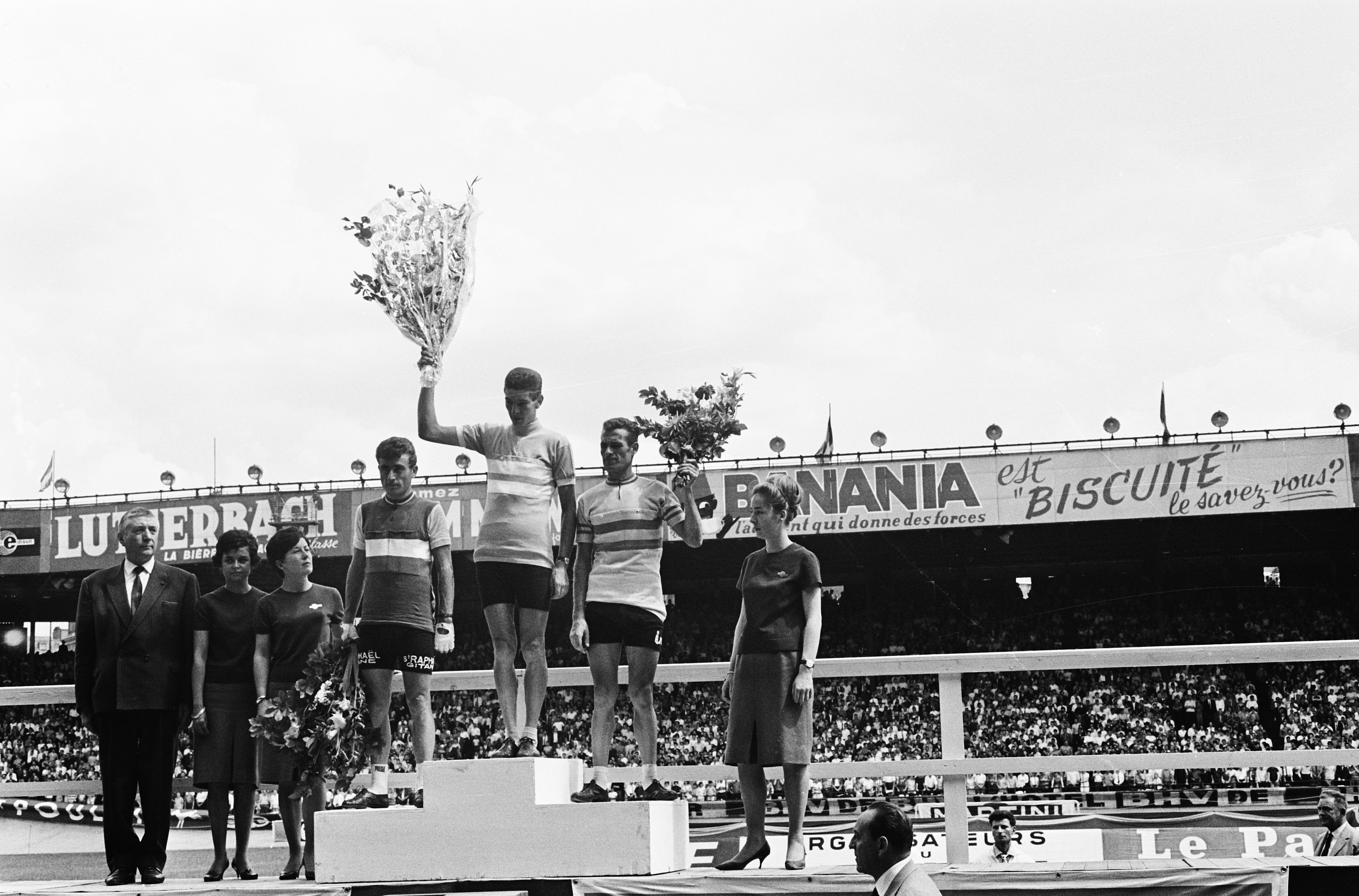 Tour de France aankomst de nummer 1, 2, 3 van Tour de lAvenir. Felice Gimondi (1), Lucien Aimar (2), Ginés García Perán (3)